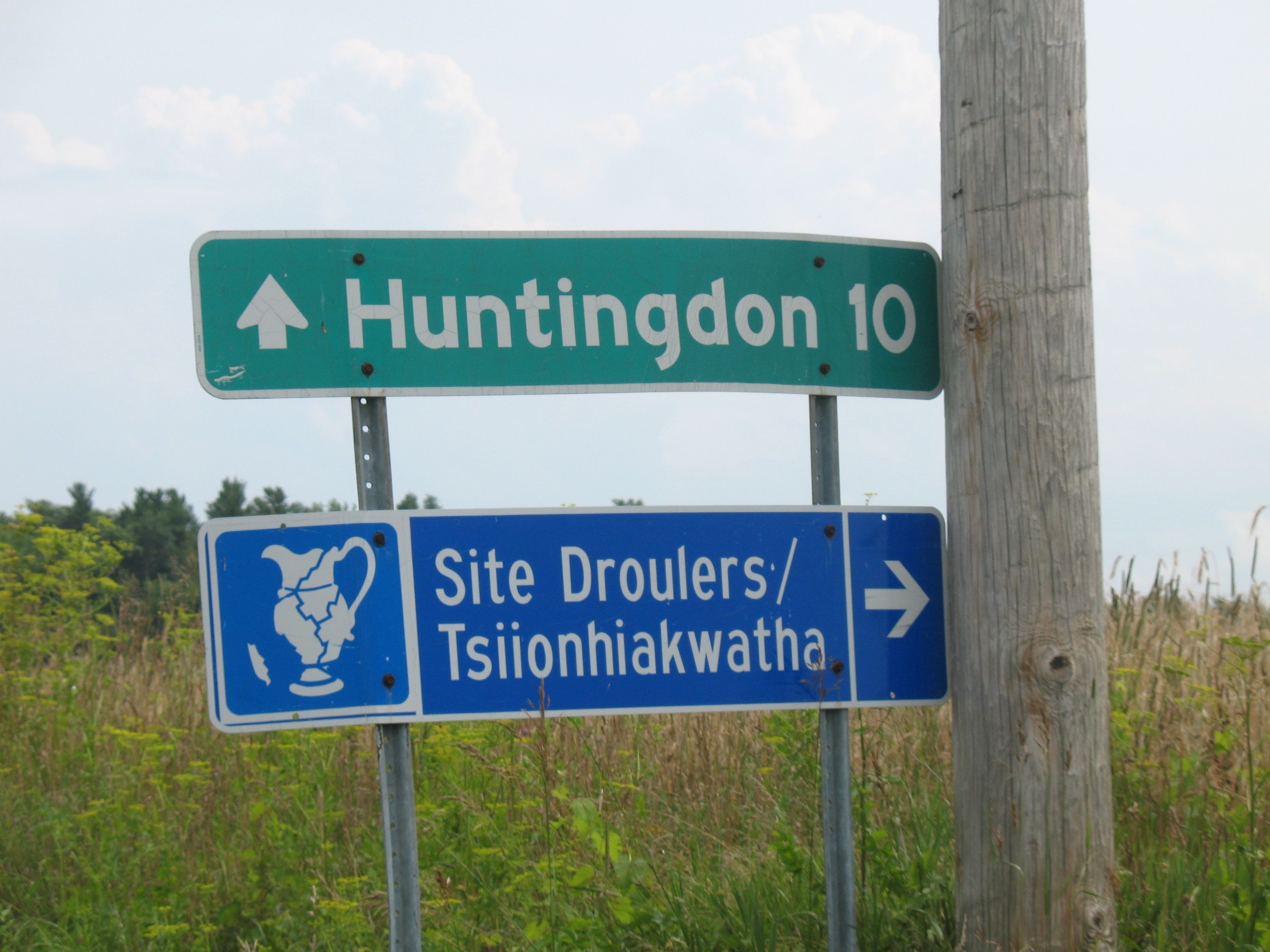 Wegweiser zum Museum Droulers-Tsiionhiakwatha